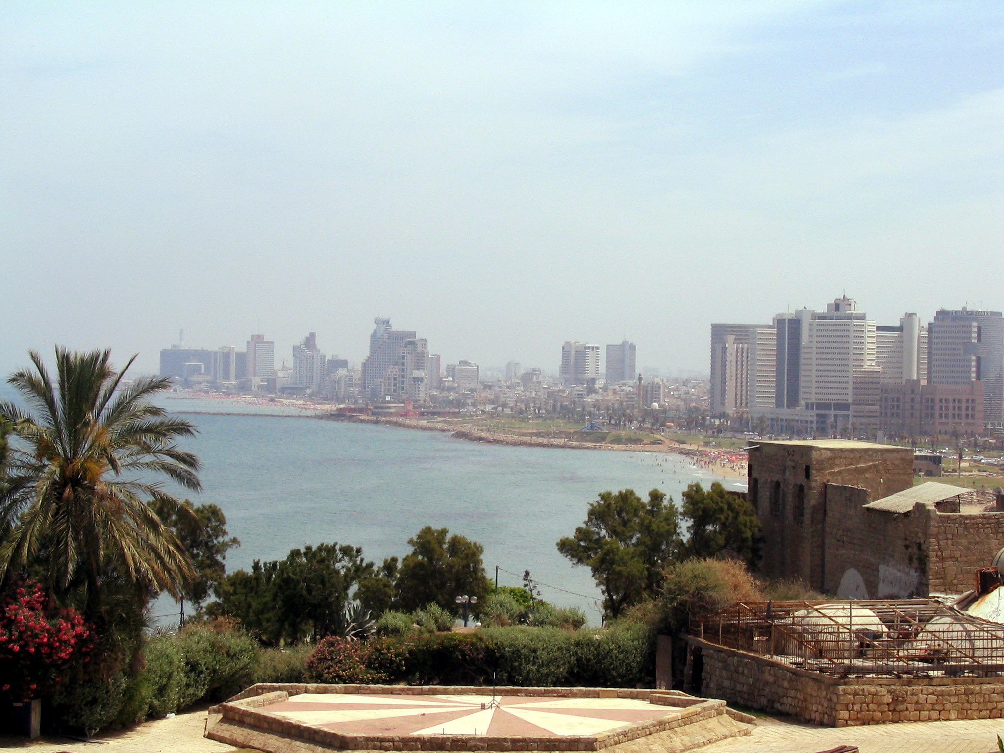 Tel Aviv seen from Jaffo